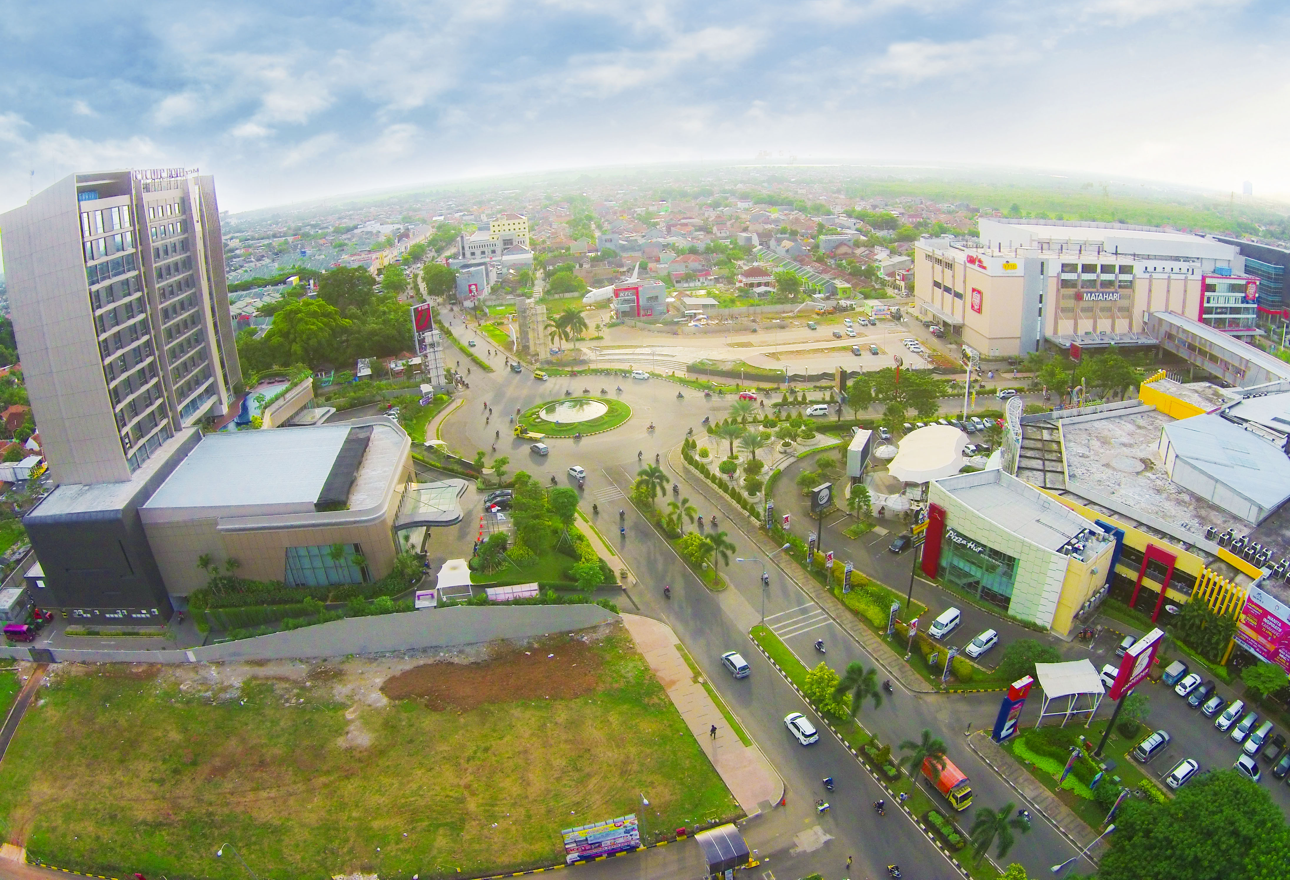 Kawasan utama di bundaran Galuh Mas yang dikelilingi Mercure Hotel, Karawang Central Plaza, Festive Walk, Technomart, Taman Galuh Mas, dll.